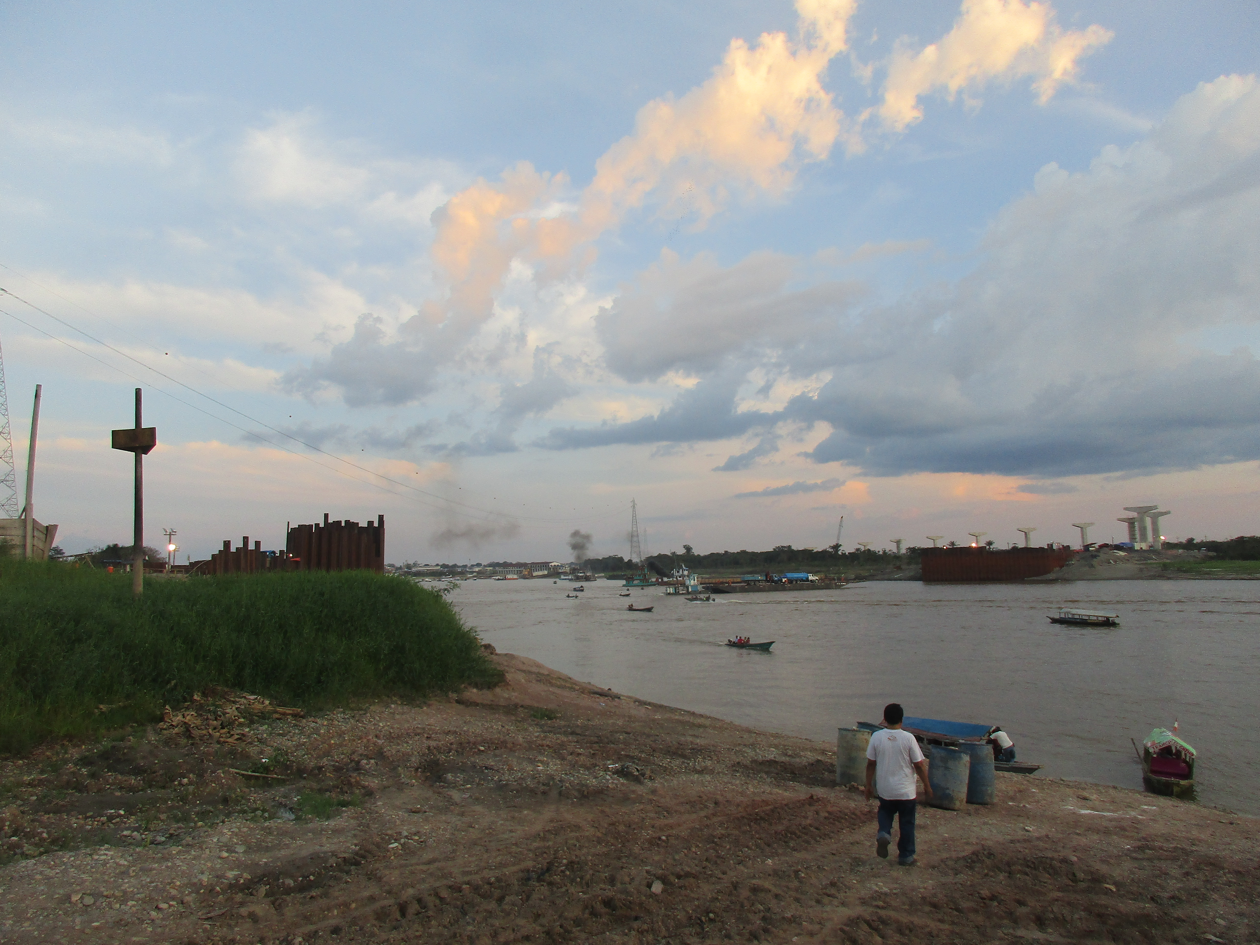 Avance de la construcción del puente nanay en las dos orillas del río del mismo nombre.